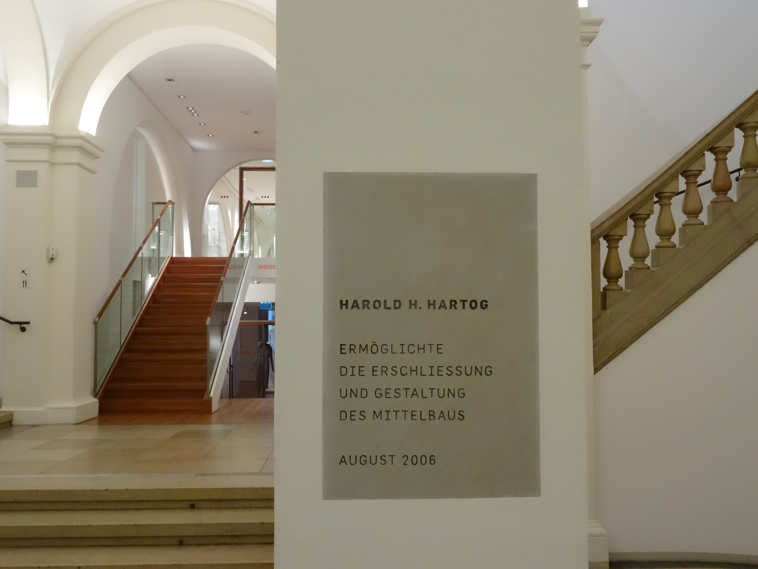 Stifter-Schild - Harold A. Hartog - an der Haupttreppe des MKG